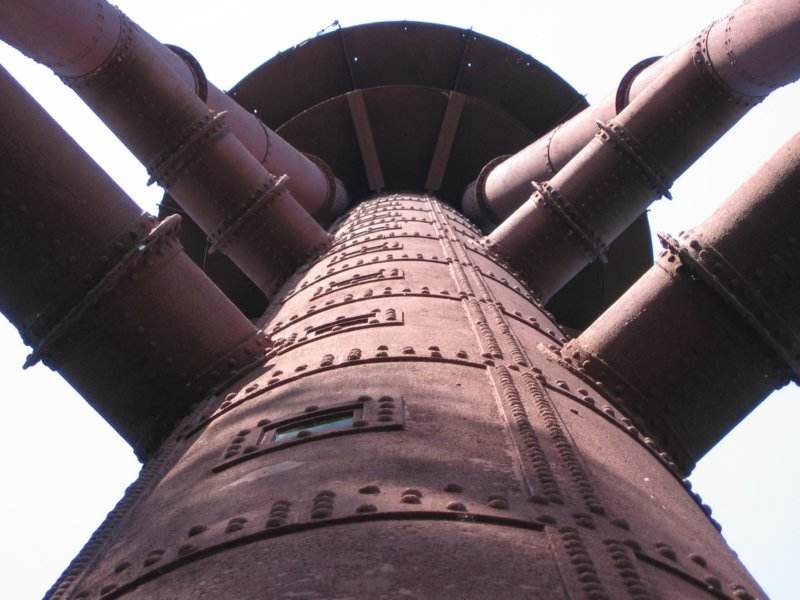 Ruhnu tuletorn.